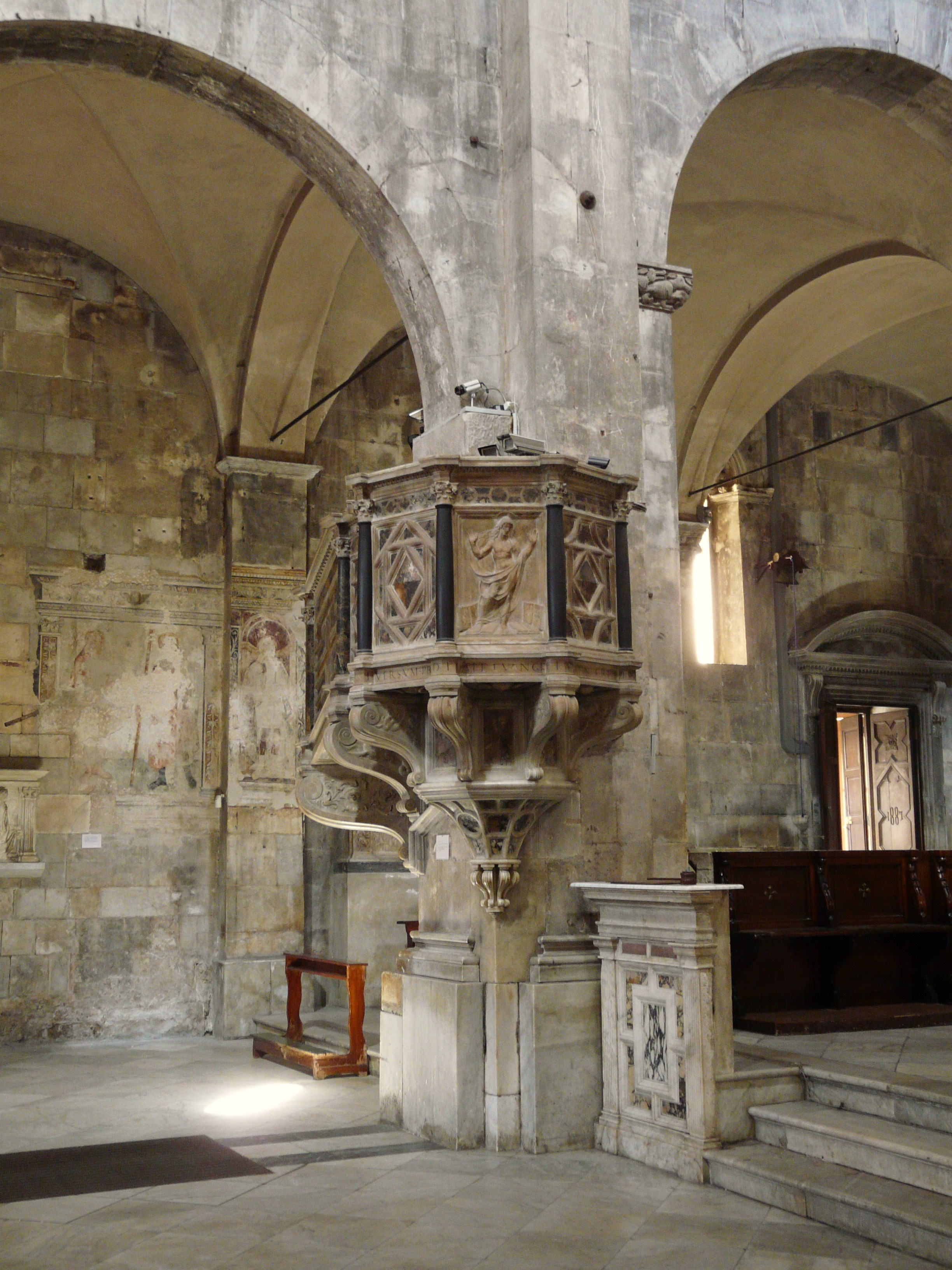 Pulpito della cattedrale di Carrara, Toscana, Italia